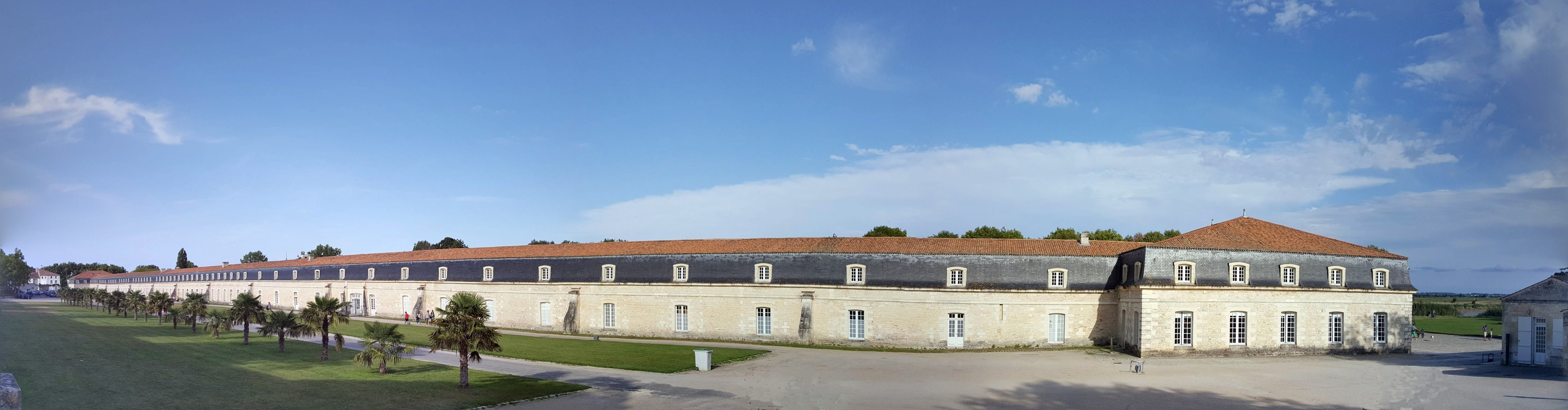 La Corderie Royale à Rochefort (Charente-Maritime) en France, vue depuis le jardin de la Galissonnière. It is indexed in the Base Mérimée, a database of architectural heritage maintained by the French Ministry of Culture, under the references PA00104863 and IA17000294.